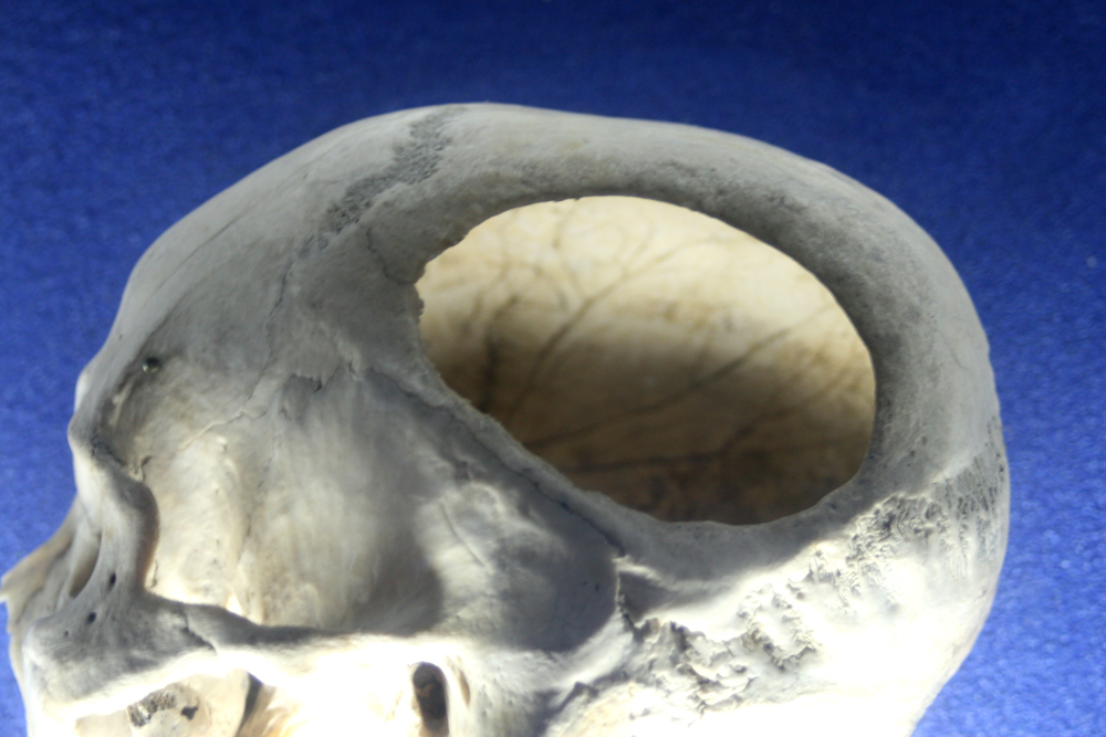 gros plan de trépanation sur crâne humain néolithique découvert à Nogent-les-Vierges (Seine-et-Oise, France) - vitrine du Musée de l'Homme, Paris